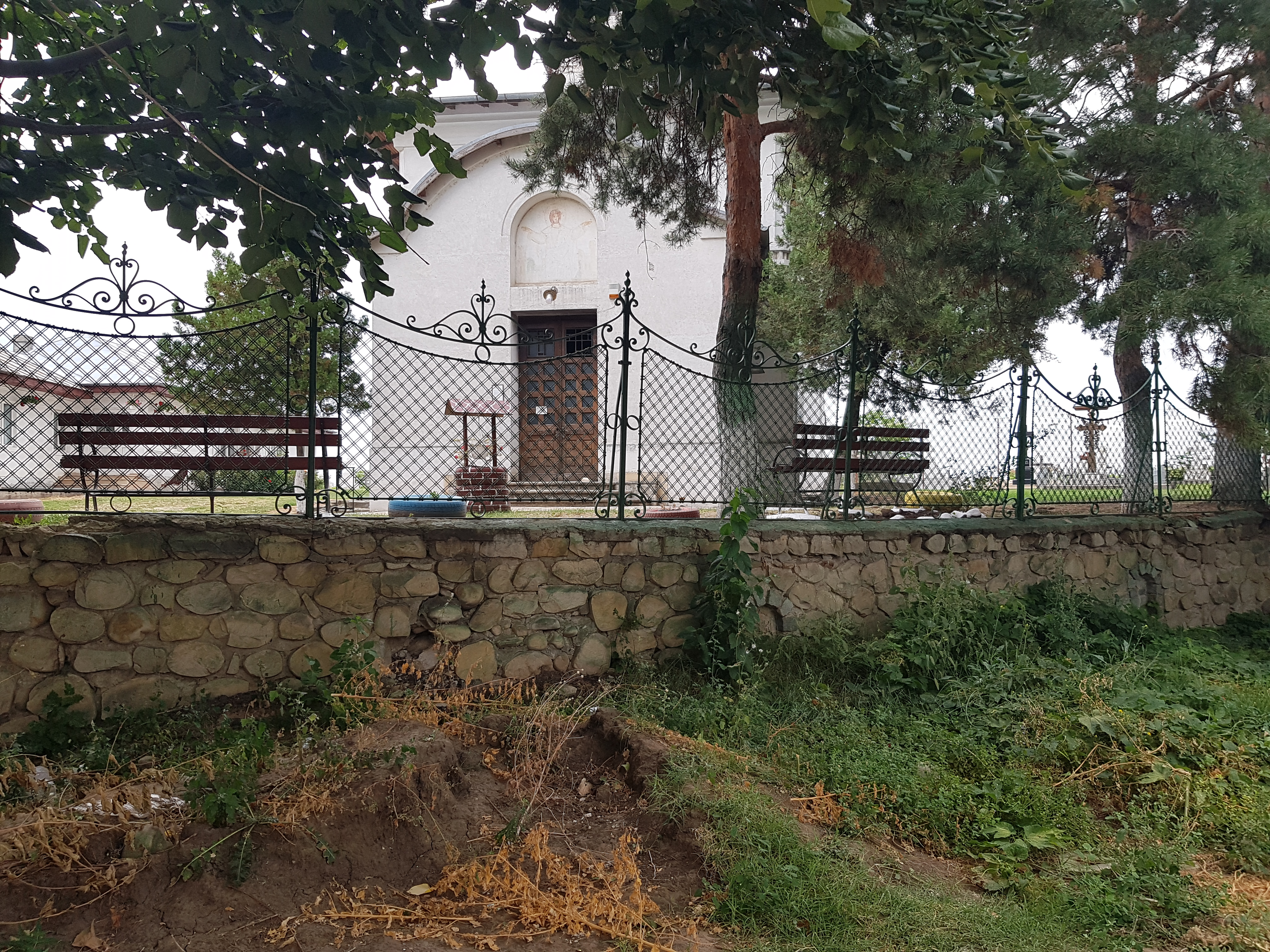 Zid de incintă 03